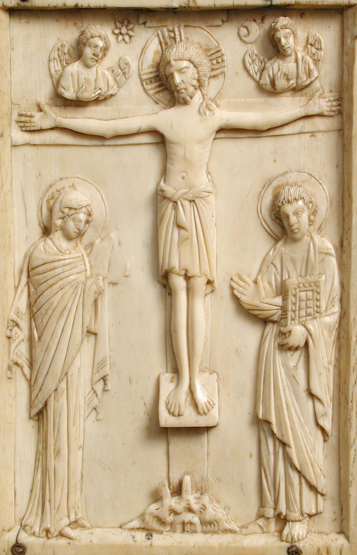 Crucifixión bizantina en marfil; detalle de una de las dos cubiertas del Evangelario de la reina de Aragón Felicia de Roucy, esposa de Sancho Ramírez (rey de Aragón 1063–1094), casada ca. 1070 con el monarca aragonés.